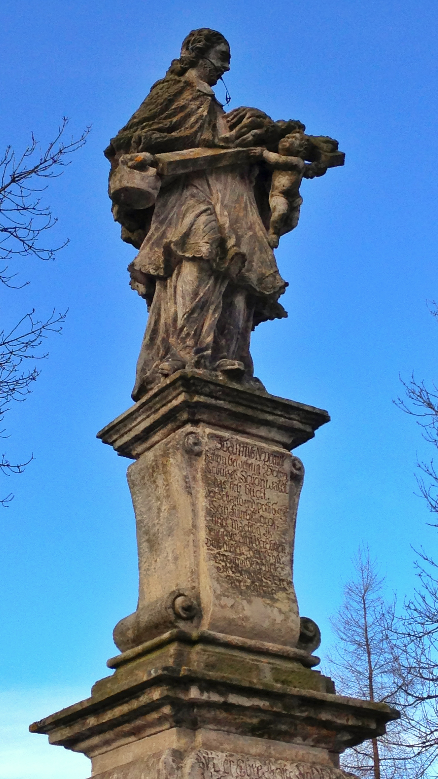 Socha svatého Jana Nepomuckého v Krásném Lese v Krušných horách, která je kulturní památkou ČR.